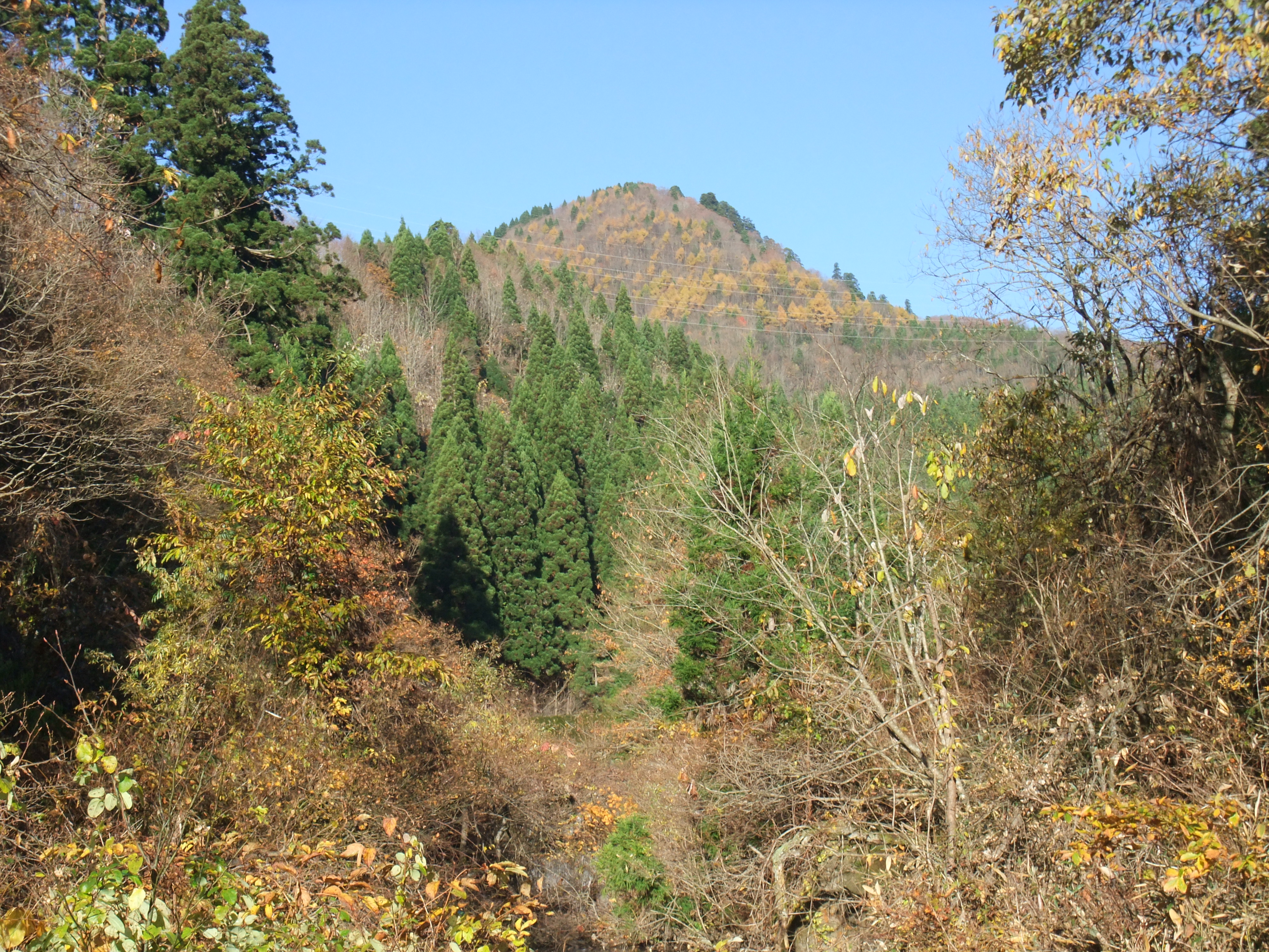 日景温泉方面から見た甚吉森